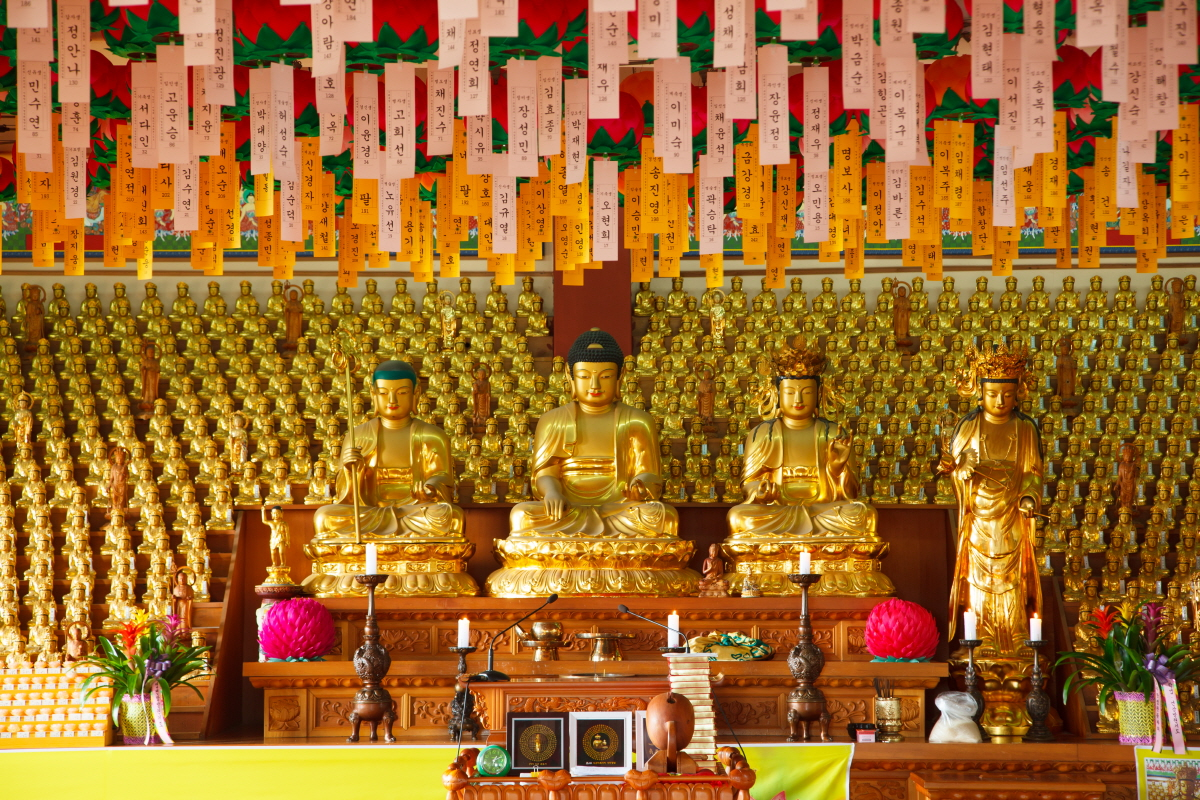 보물 제1842호 익산 관음사 목조보살입상 ((益山 觀音寺 木造菩薩立像)) - 전면부